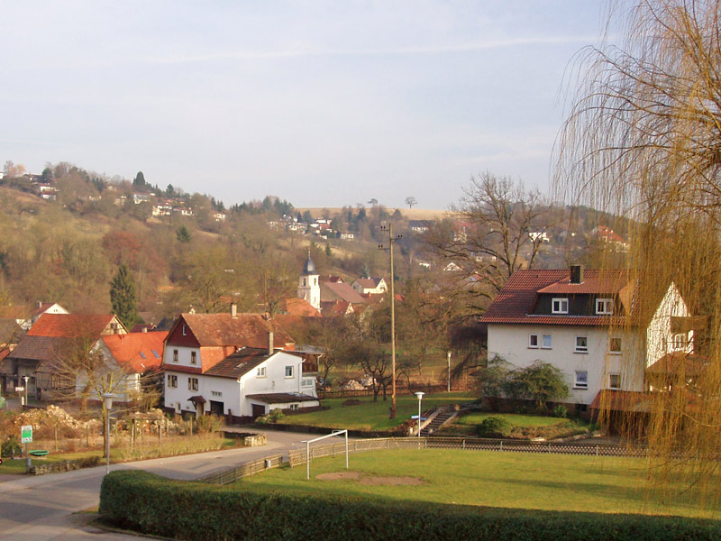 Blick vom ehem. Rathaus über Bad Rappenau-Wollenberg